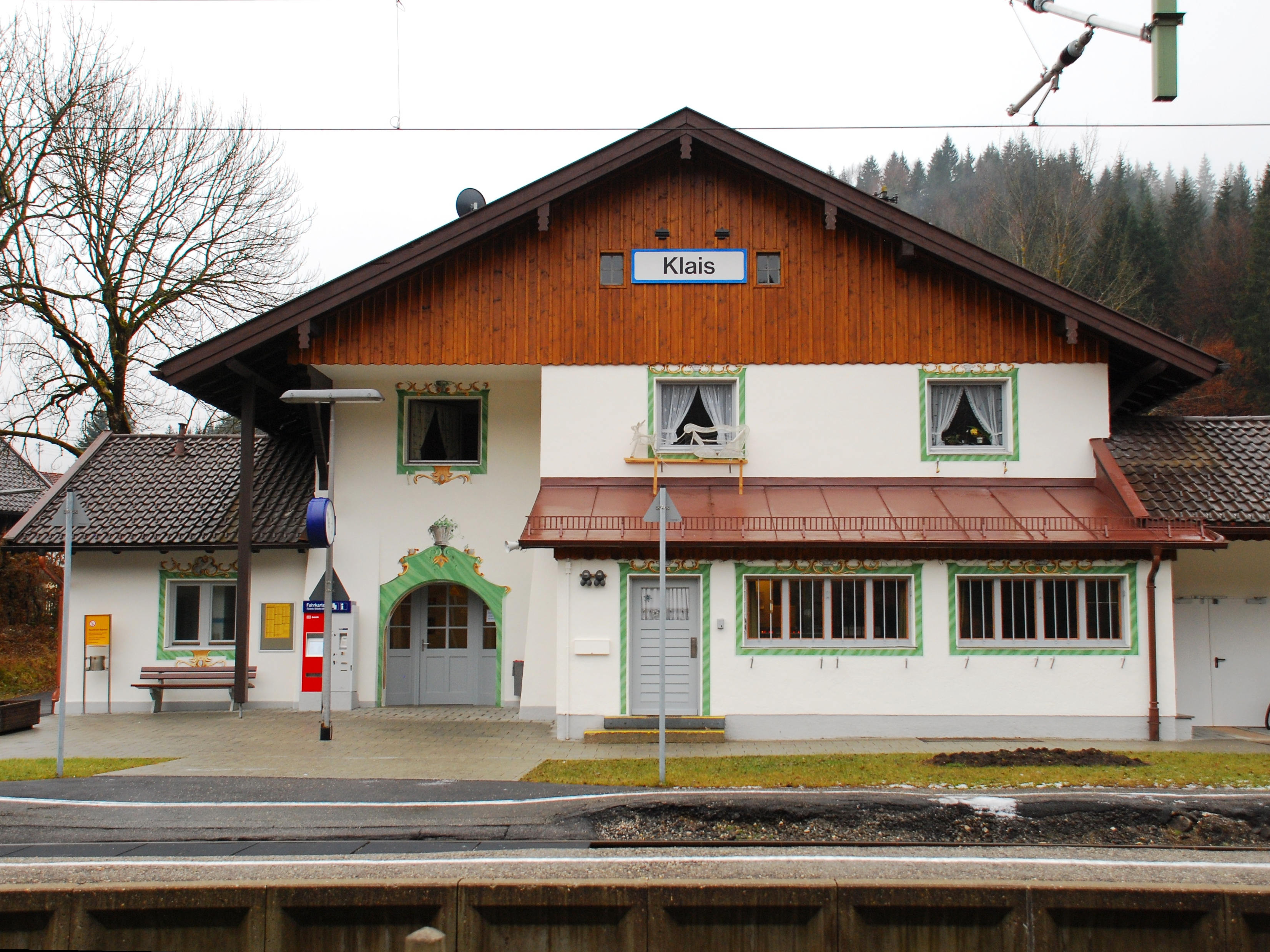 Bahnhof in Klais, Gemeinde Krün, Landkreis Garmisch-Partenkirchen, Regierungsbezirk Oberbayern, Bayern.